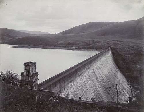 മുല്ലപ്പെരിയാർ ഡാം